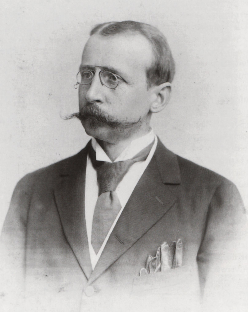 Alfred Schliz, (* 18. September 1849 in Heilbronn, † 22. Juni 1915 ebenda) Arzt und Altertumsforscher. Aufnahme von 1877.